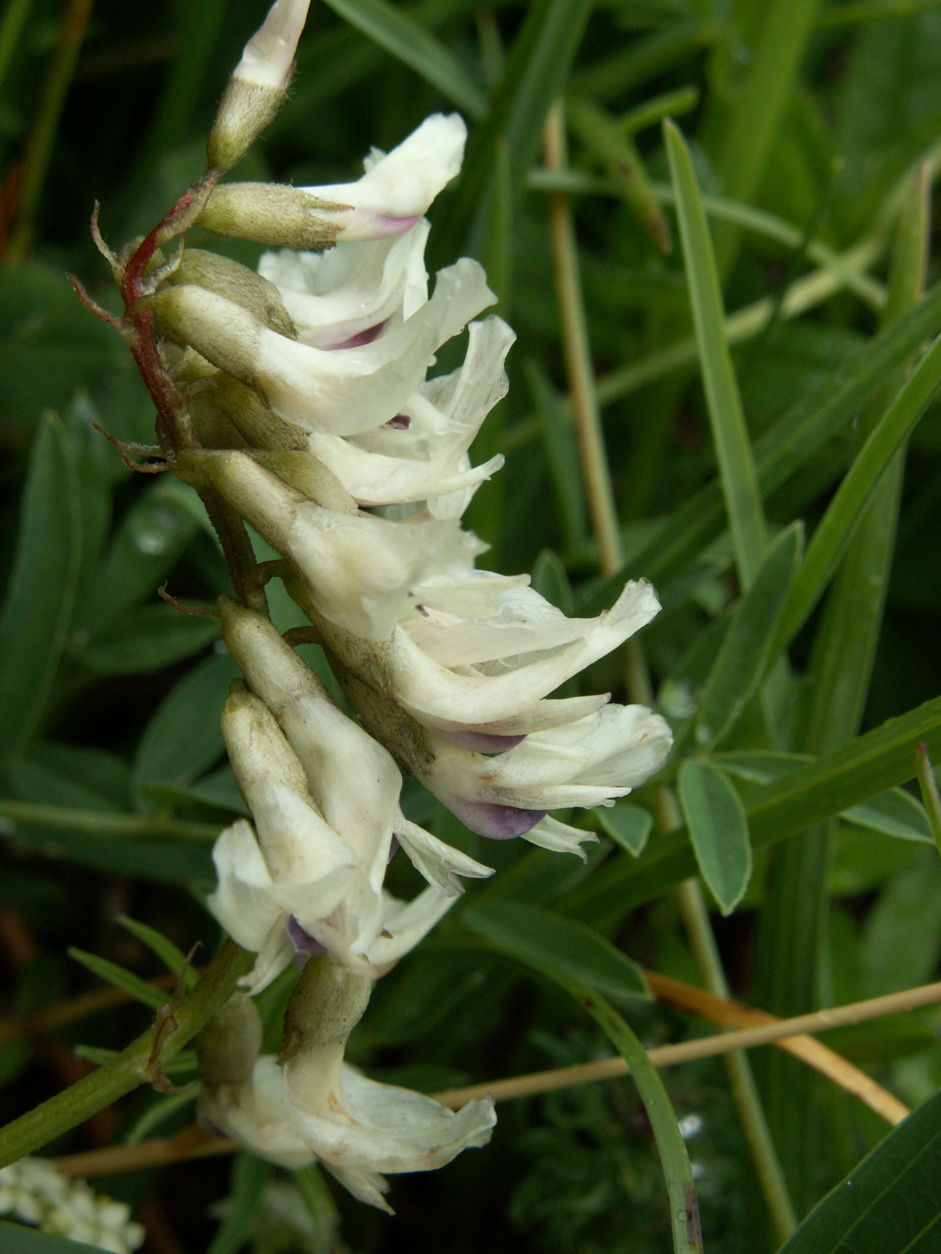 Astragalus australis, Schynige Platte, Kanton Bern, Schweiz